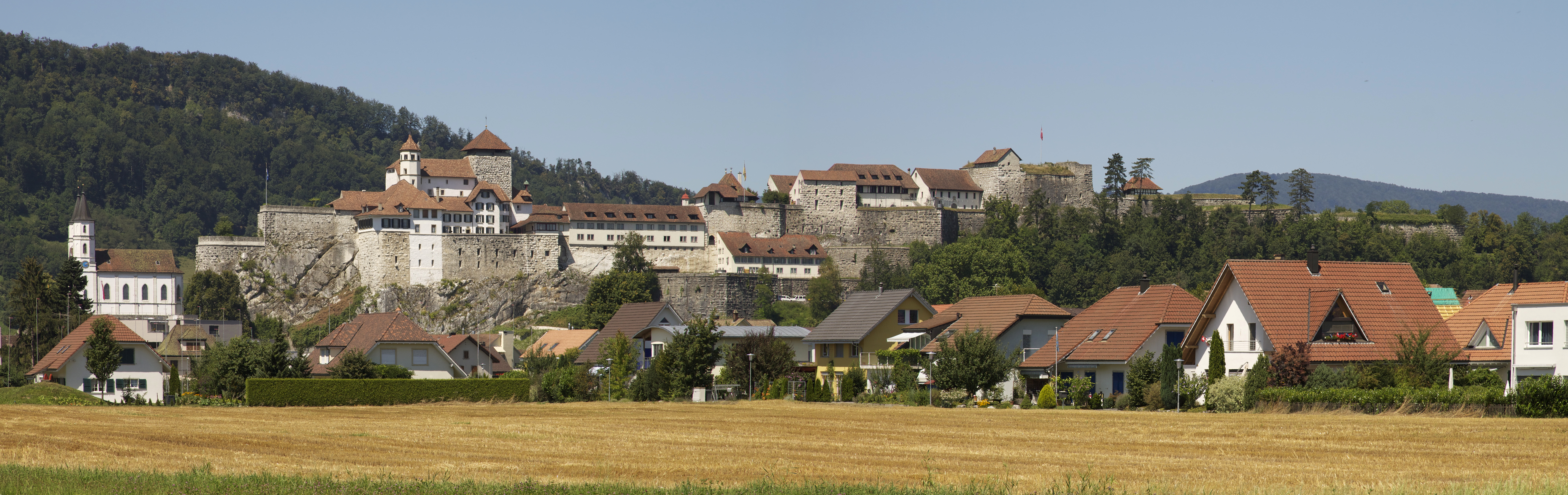 Ein Panorama der Südfassade der Festung Aarburg.